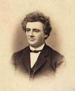 David Moses Halberstadt (1819-1874), Danish merchant